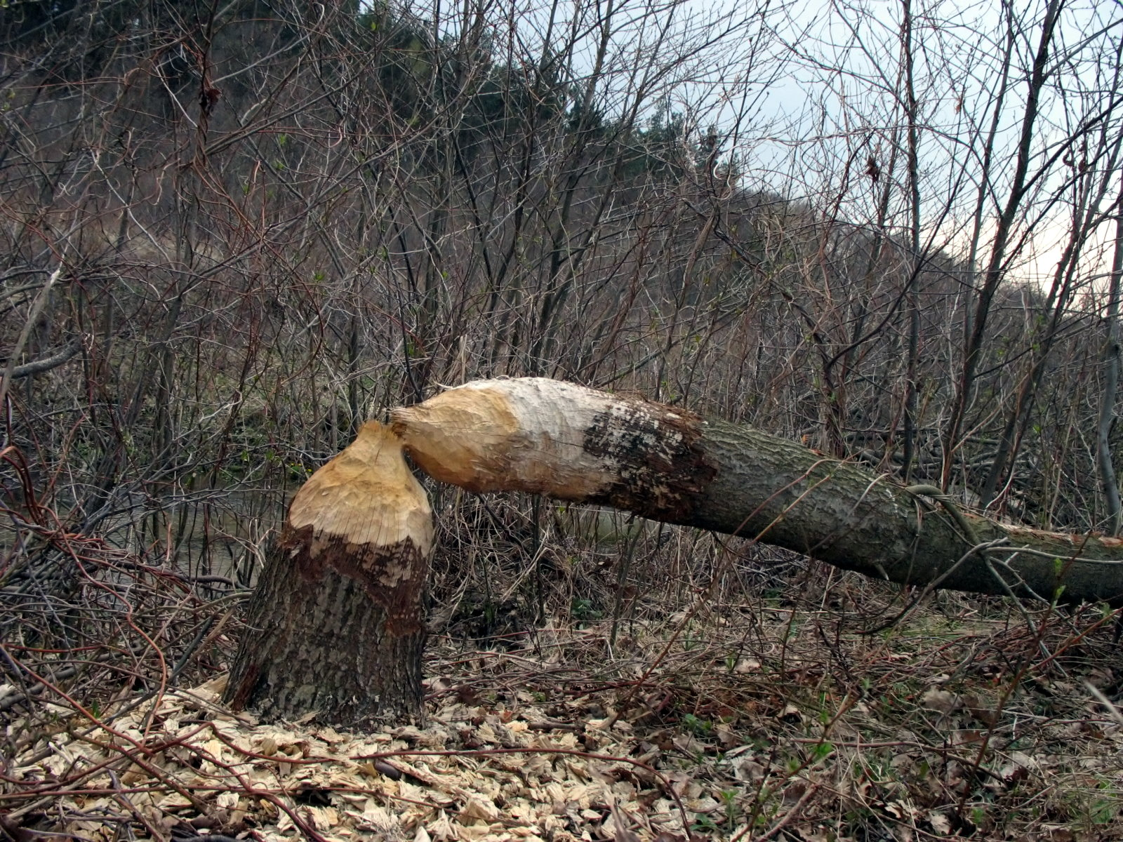 Dolina Brusienki (Polska) - drzewo ścięte przez bobry